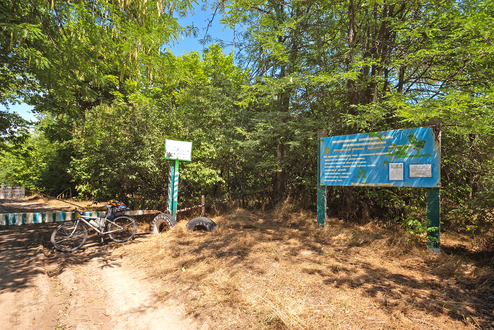 Нижньодністровський, Білгород-Дністровський, Біляївський та Овідіопольський райони